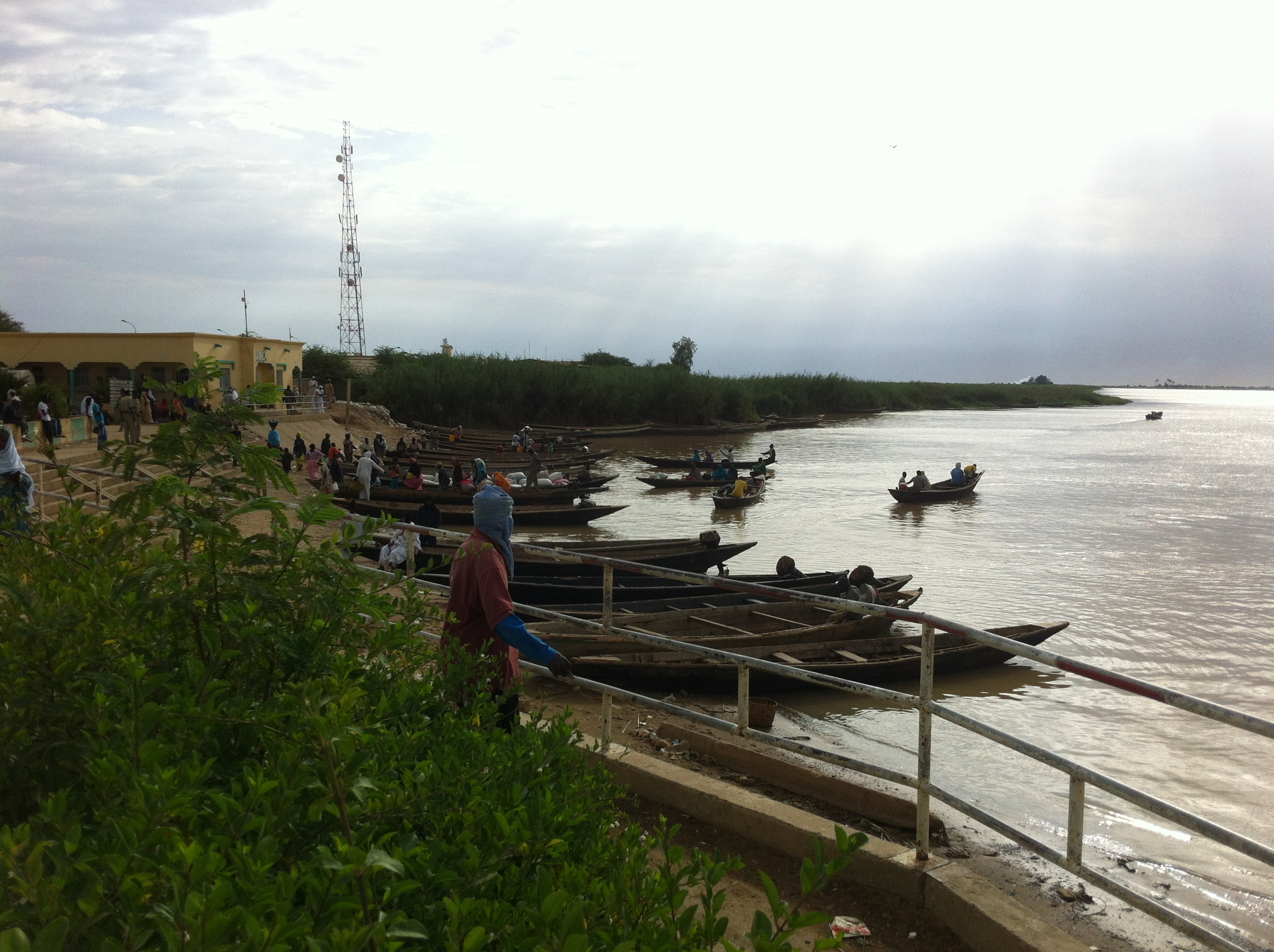 De noordelijke oever van de Senegal. Rosso Maurinaië